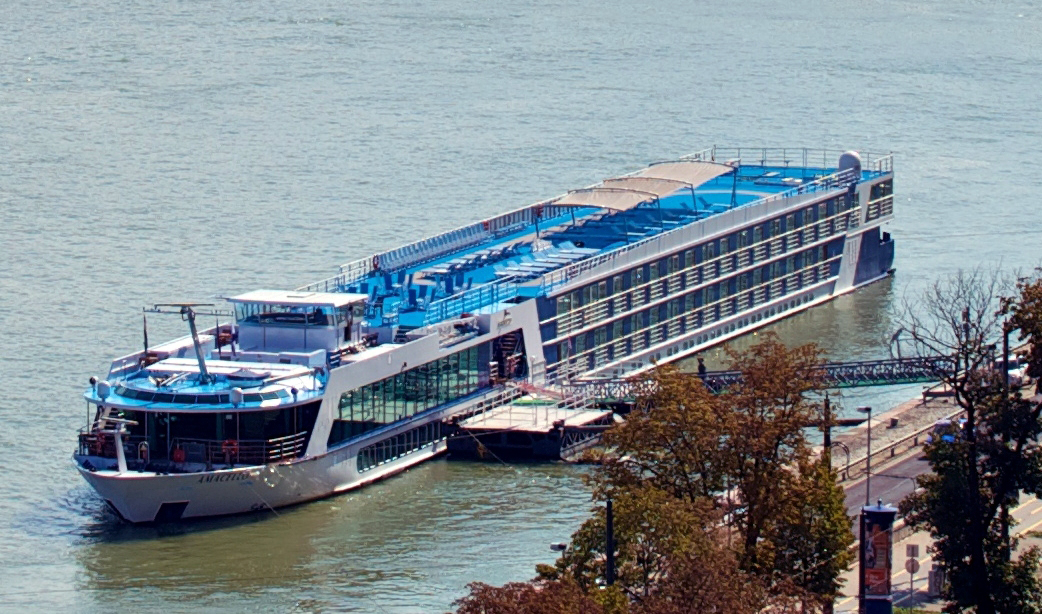 Fluss-Kreuzfahrtschiff Amacello von AMA Waterways in Budapest